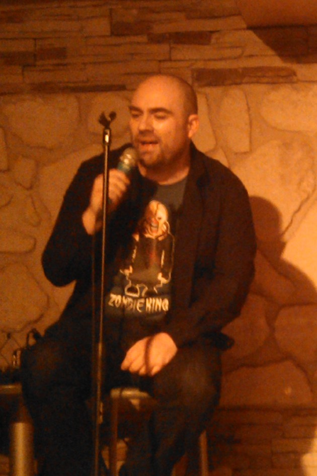 José Córdoba en un concierto en Elda